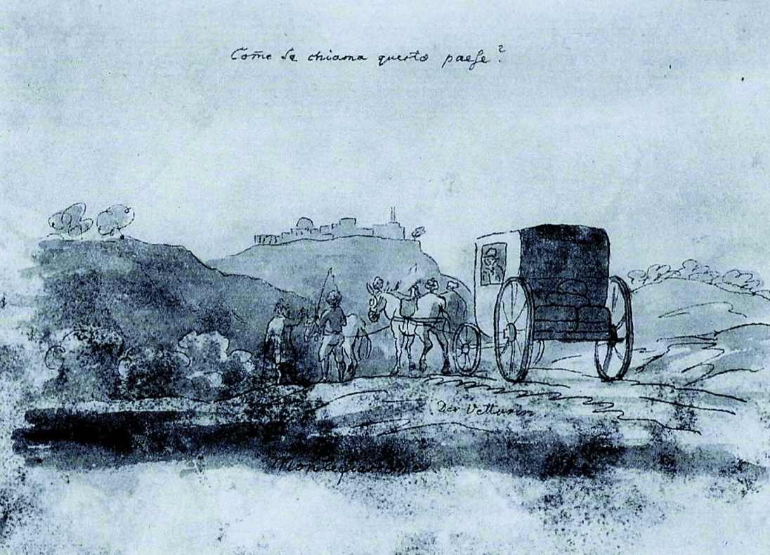 Carl Urban Kellers Reisevehikel "Vetturin" in Italien (1810)